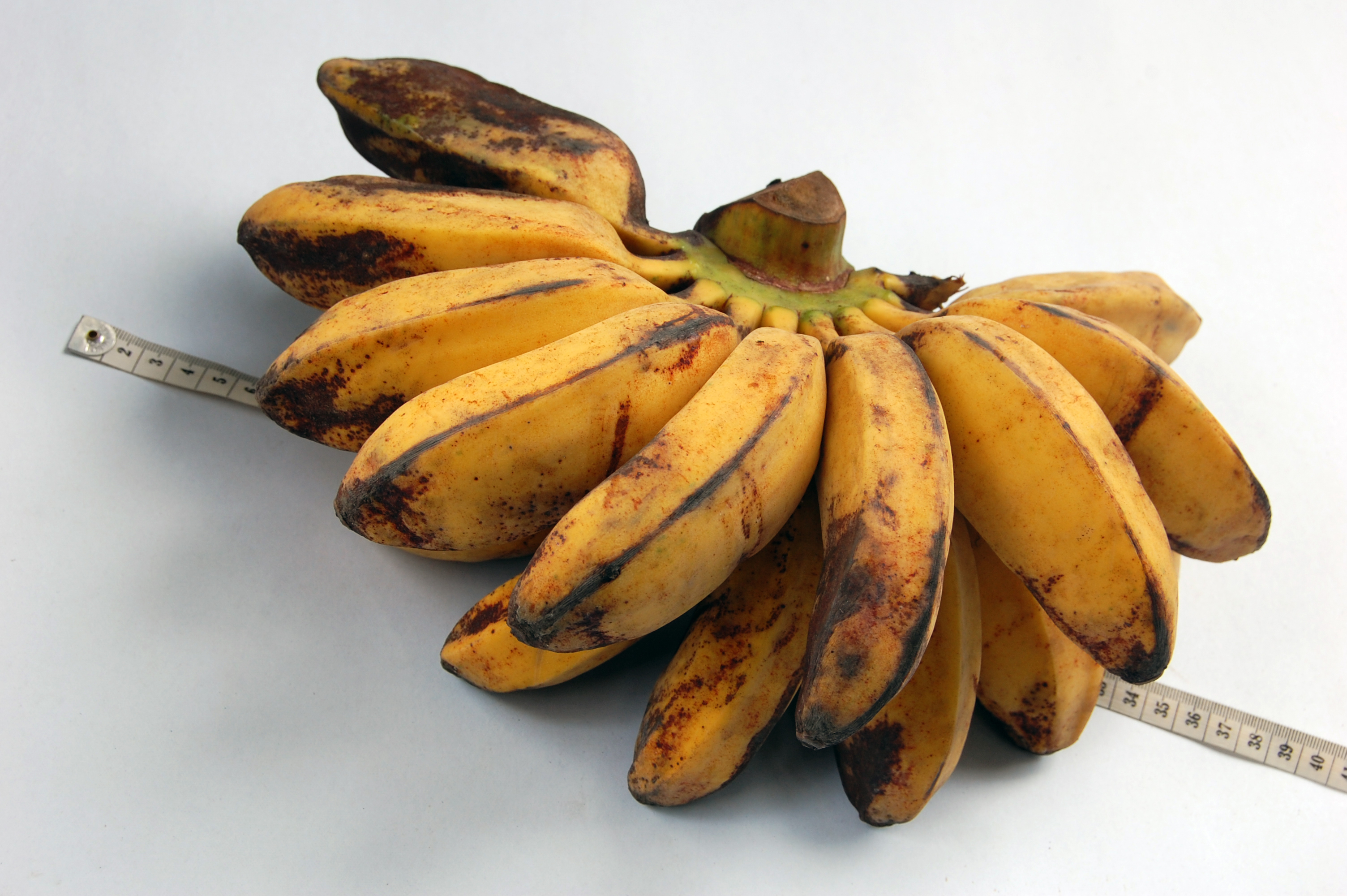 Pisang, belum diidentifikasi jenisnya